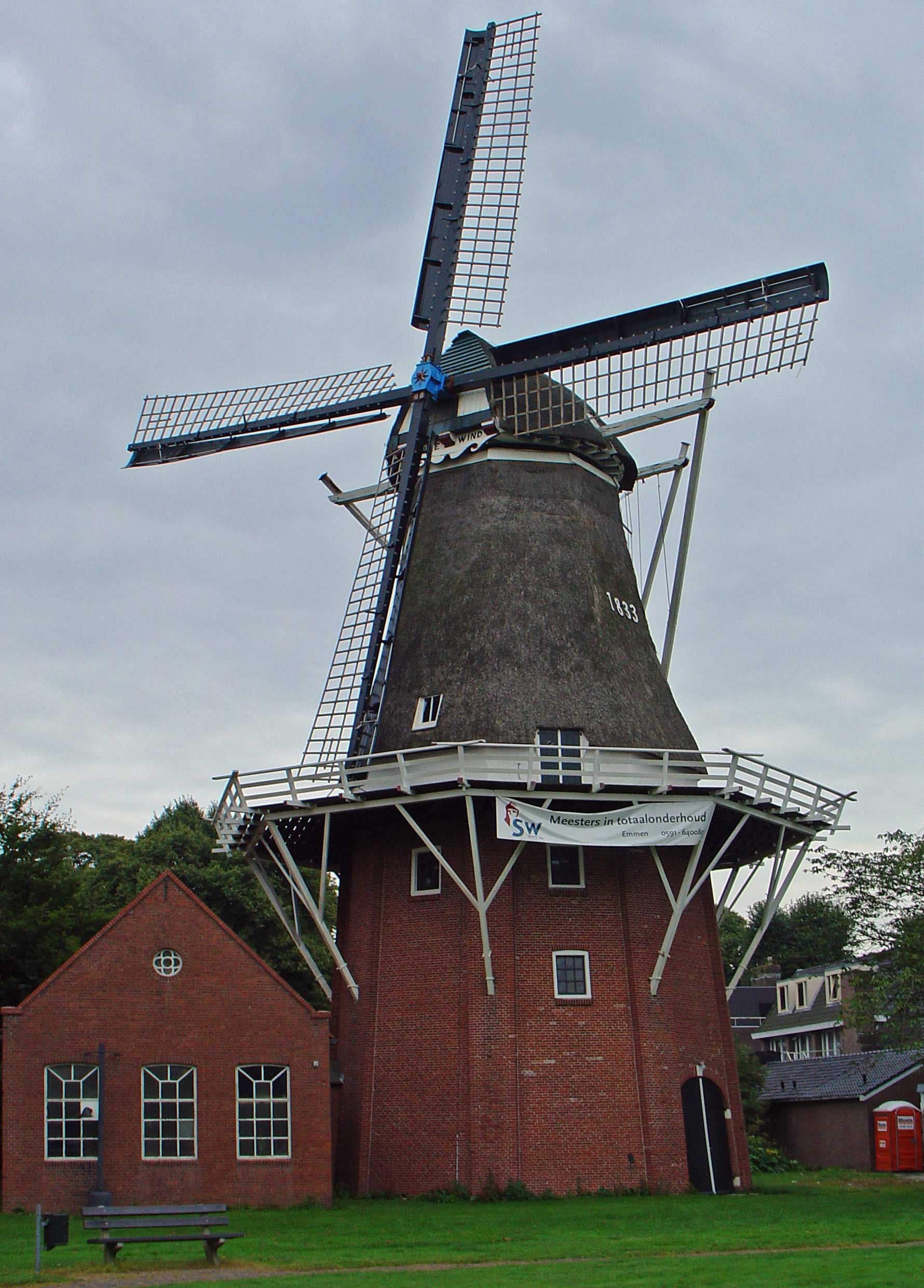 Molen de Hazewind te Gieten